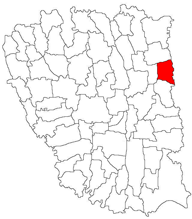 Categorie:Hărţi ale judeţului Galaţi